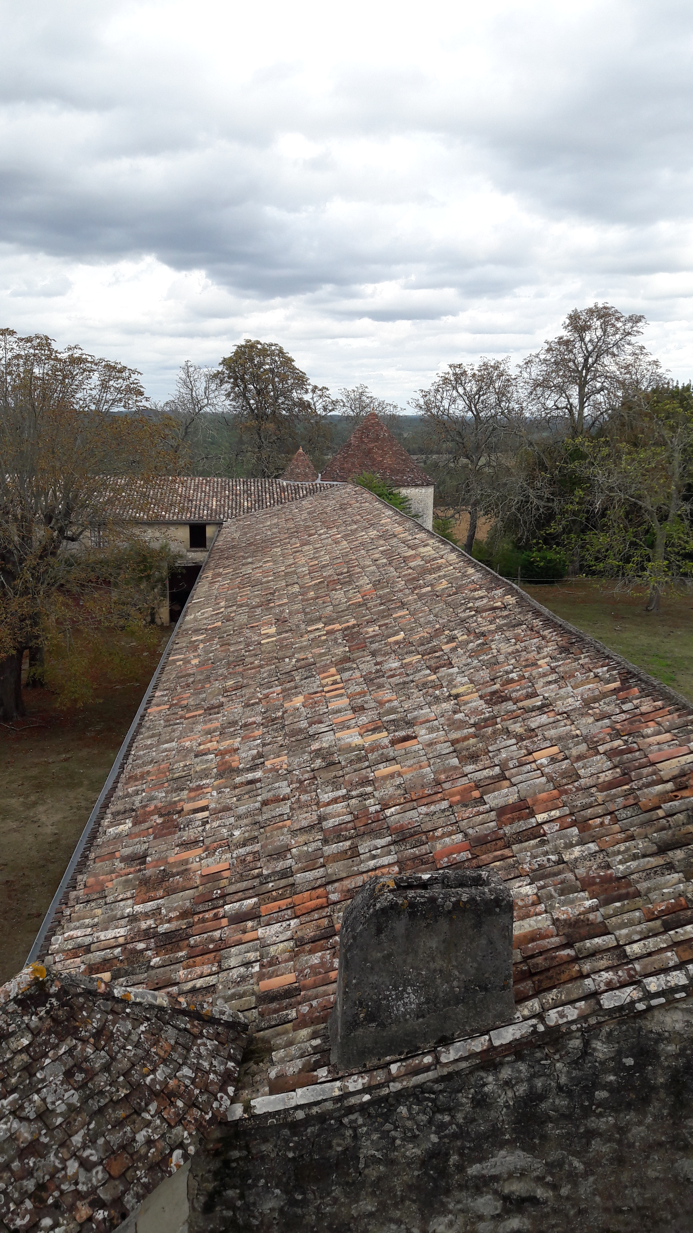 Frauenturm der Françoise de Montaigne, geb. de La Chassaigne auf dem Château de Montaigne. Blick aus einem Fenster der 2. Etage (Garderobe/Bibliothek) des Turms von Montaigne in nordöstlicher Richtung.